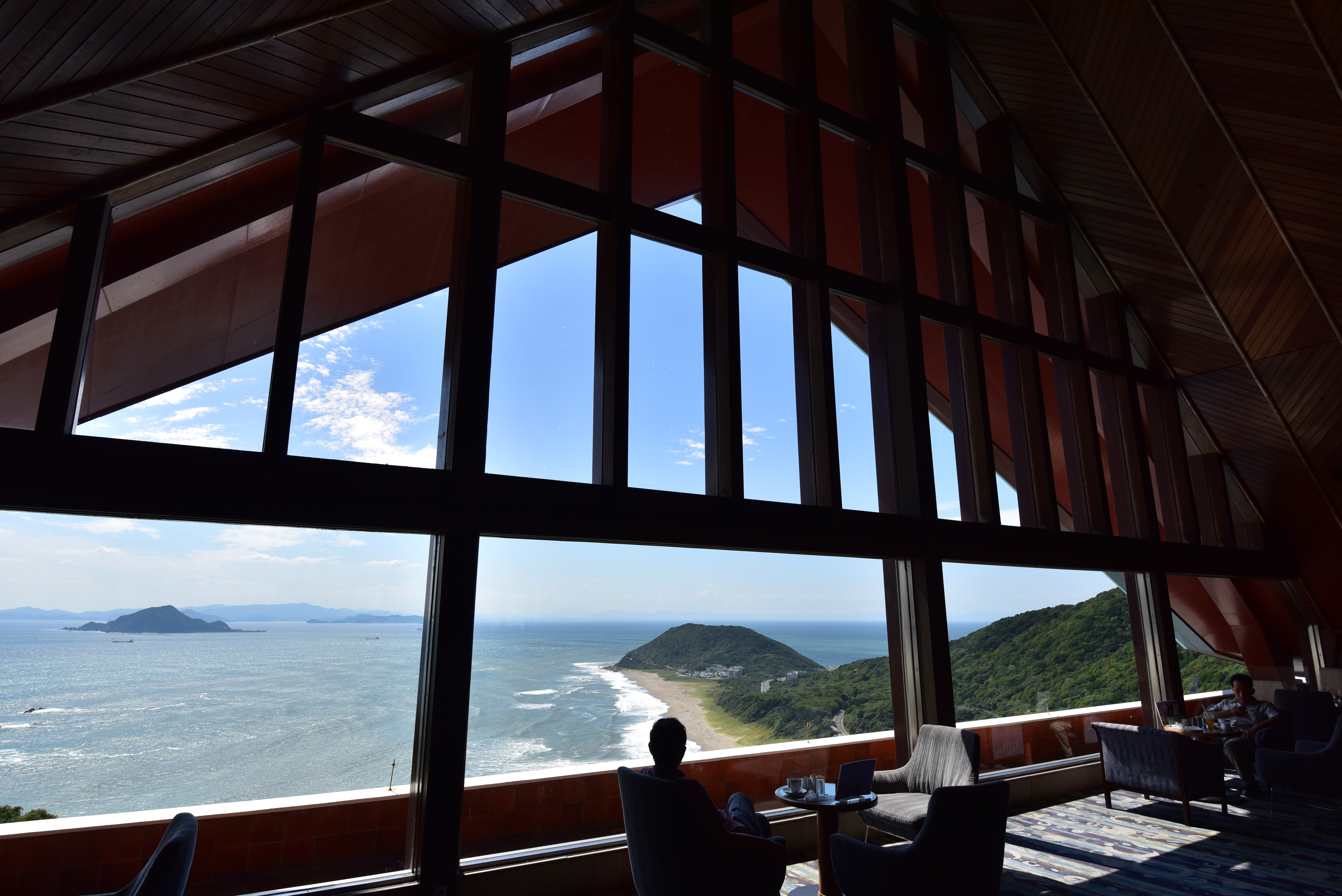 伊良湖ビューホテル内の喫茶店から伊良湖岬を望む